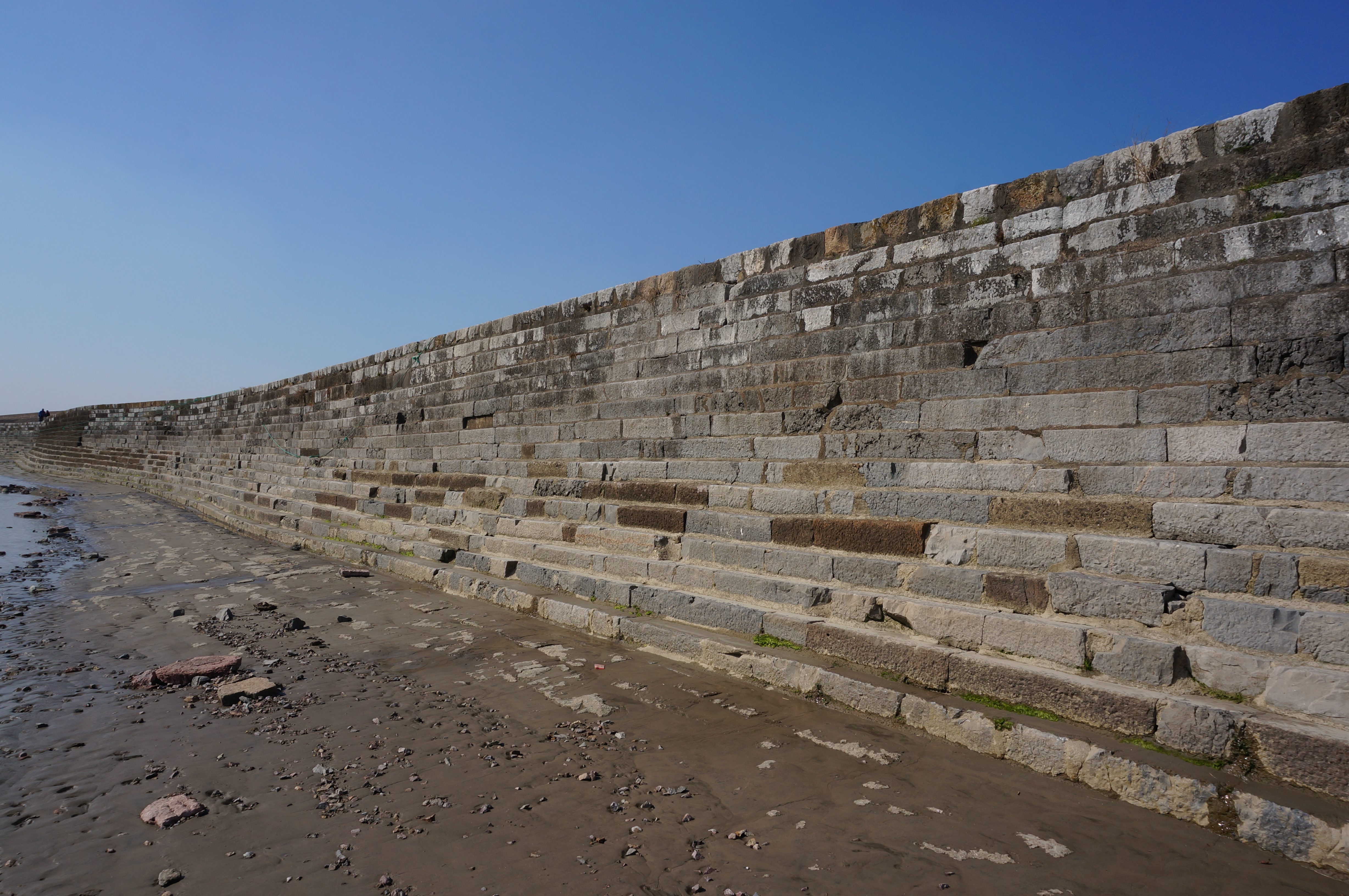 海宁海塘，老盐仓鱼鳞大石塘，建于清康熙五十九年至六十一年（1720-1722）。